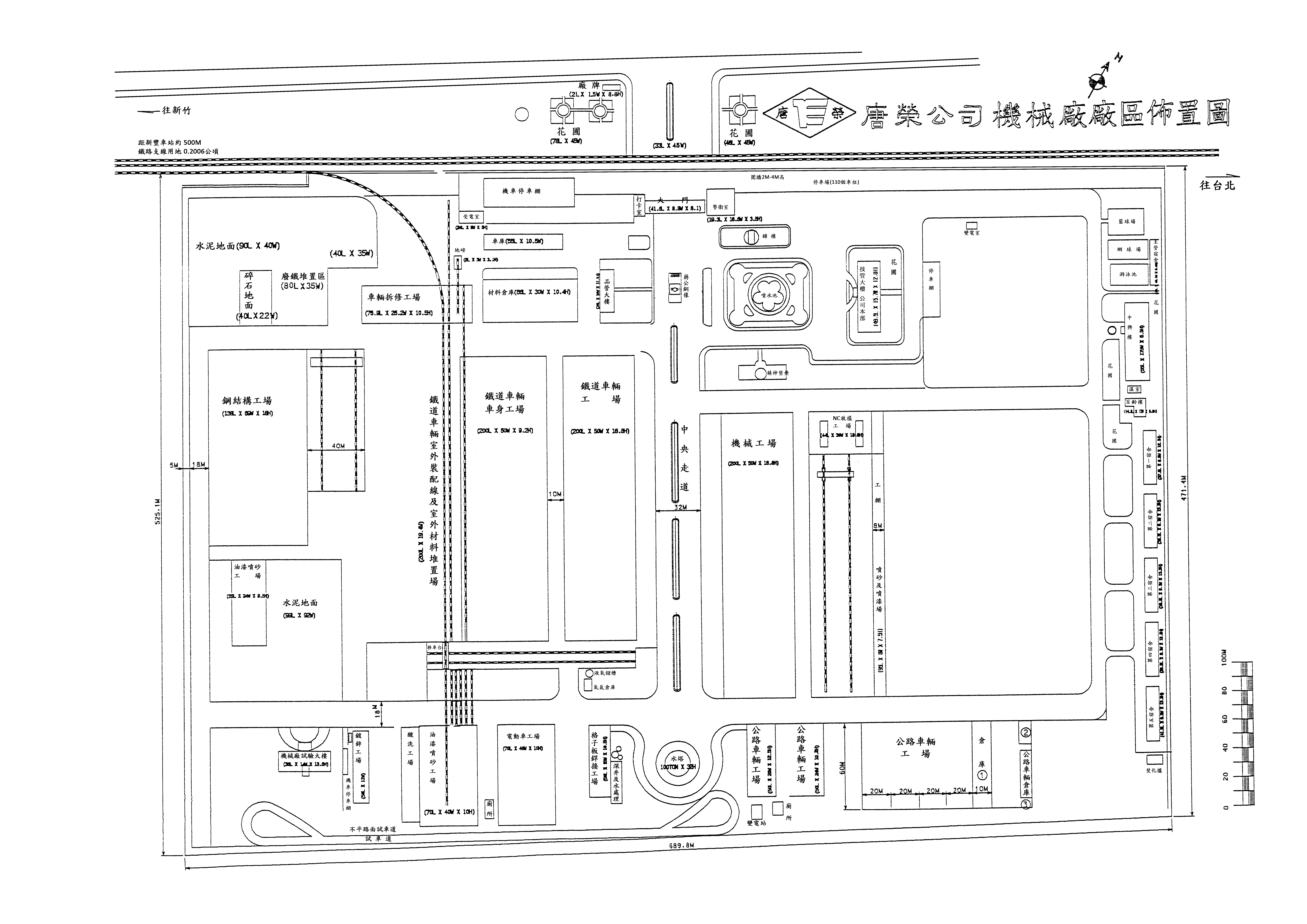 1998年唐榮鐵工廠新豐廠廠區佈置圖。